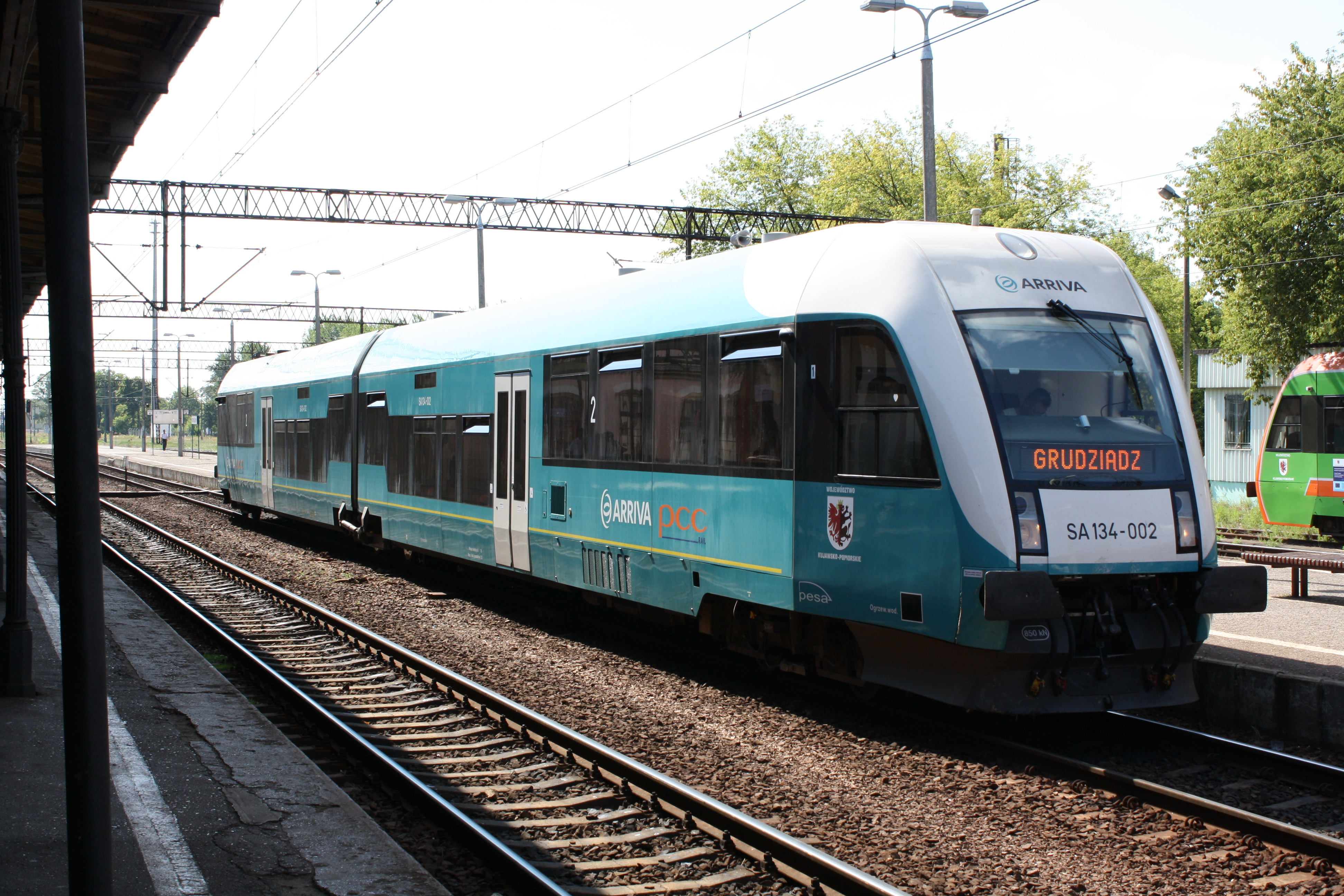 SA 134-002 spółki Arriva PCC na stacji Toruń Główny